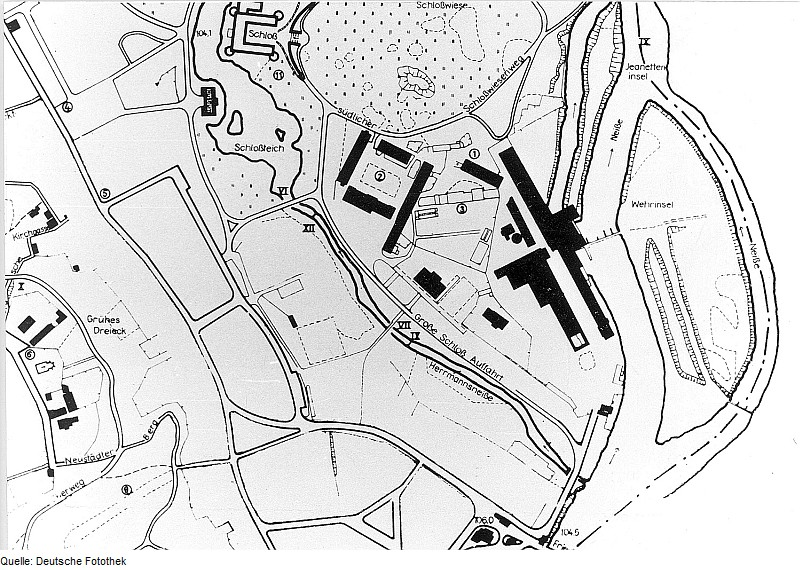 Original image description from the Deutsche Fotothek Bad Muskau. Plan des Muskauer Parks (Nr. 1 Orangerie, Nr. 2 ehem. Ökonomie, Nr. 3 Tropenhaus)